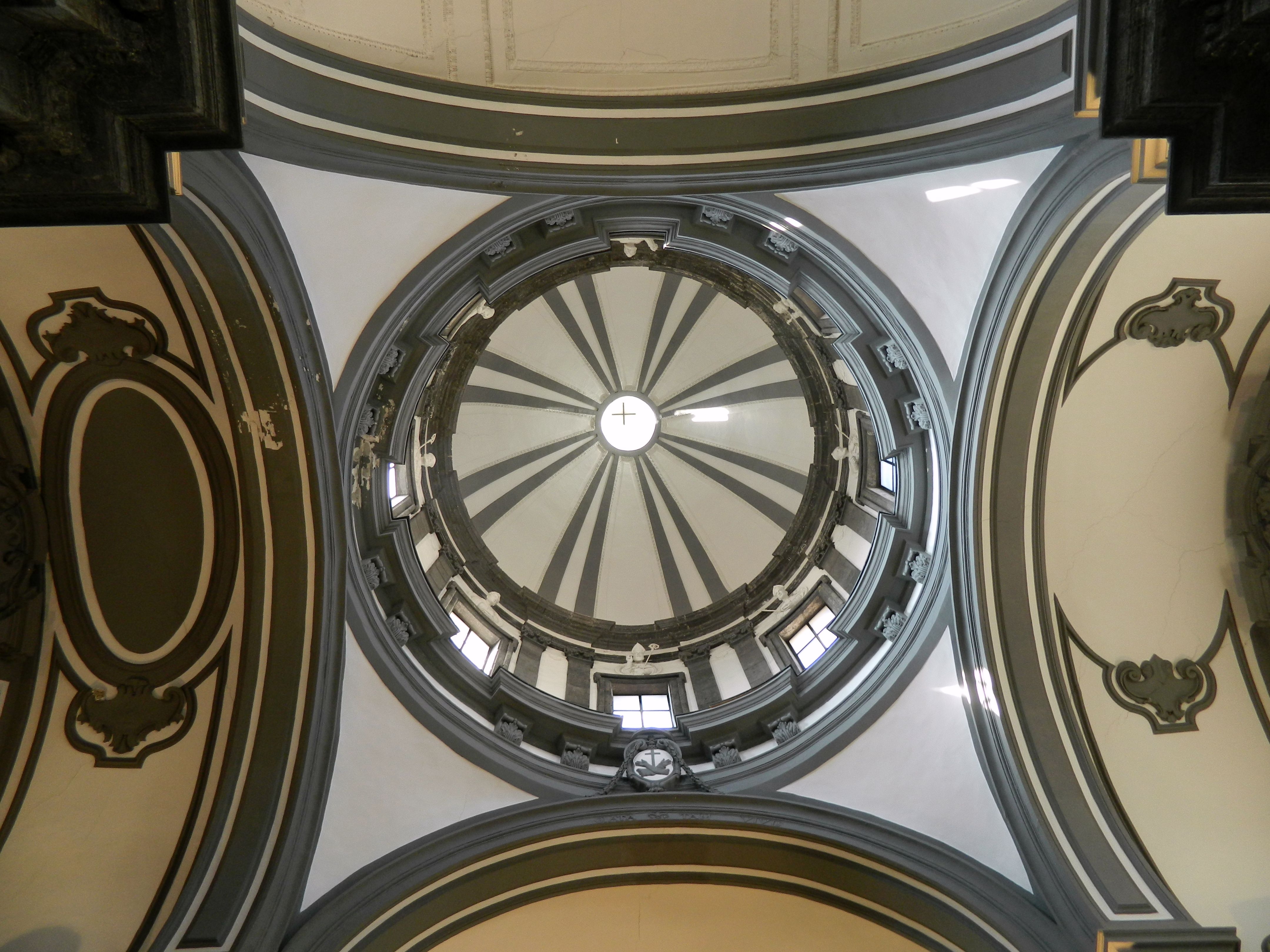 Chiesa di San Severo al Pendino (Napoli) - Cupola